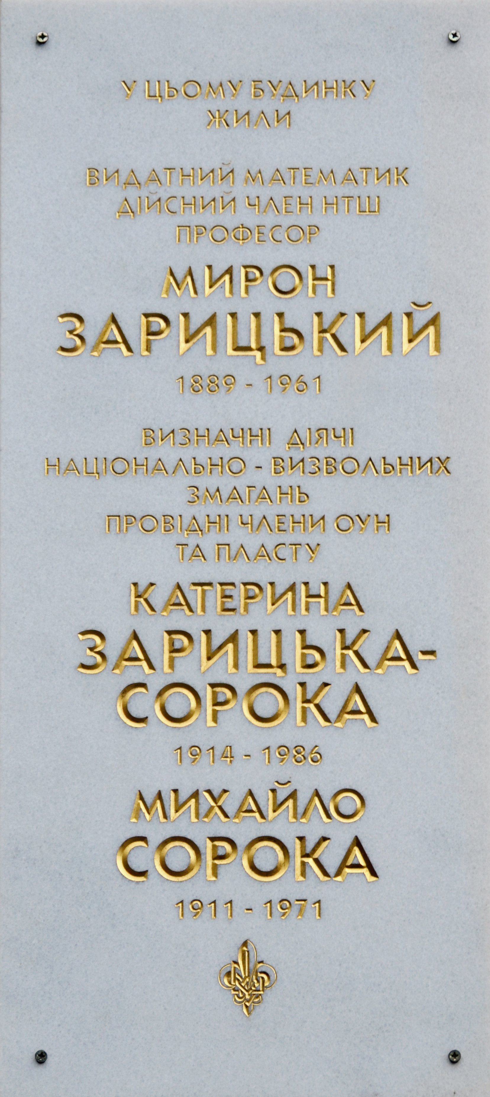 Меморіальна таблиця на будинку № 27 на вулиці Зарицьких у Львові.